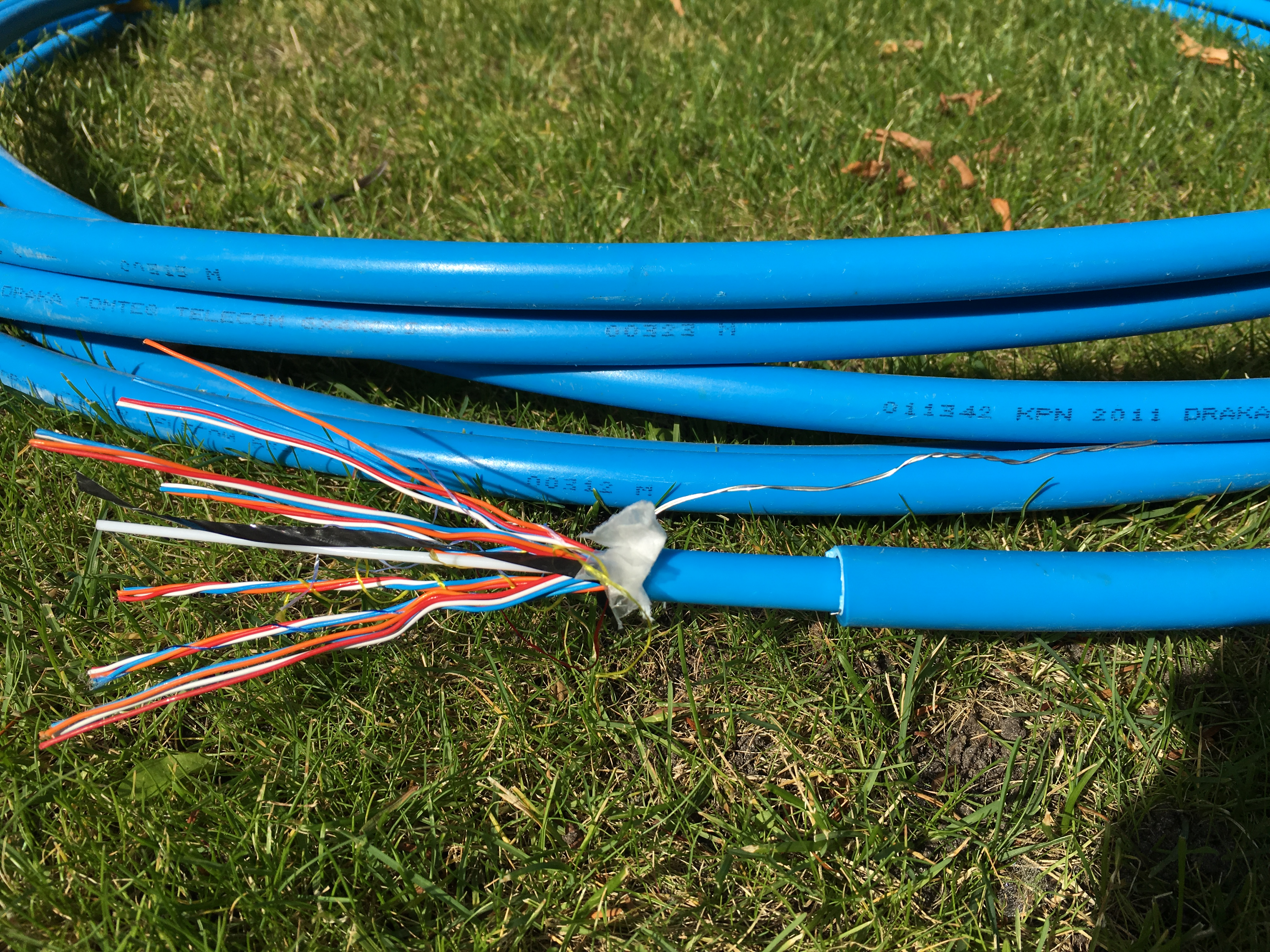 KPN Telefoonkabel